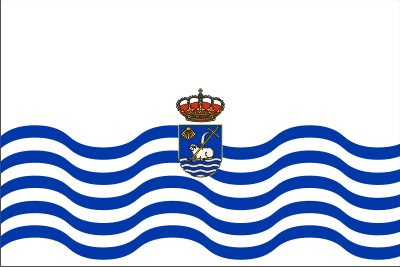 Bandera de San Juan de la Rambla (Santa Cruz de Tenerife, España)